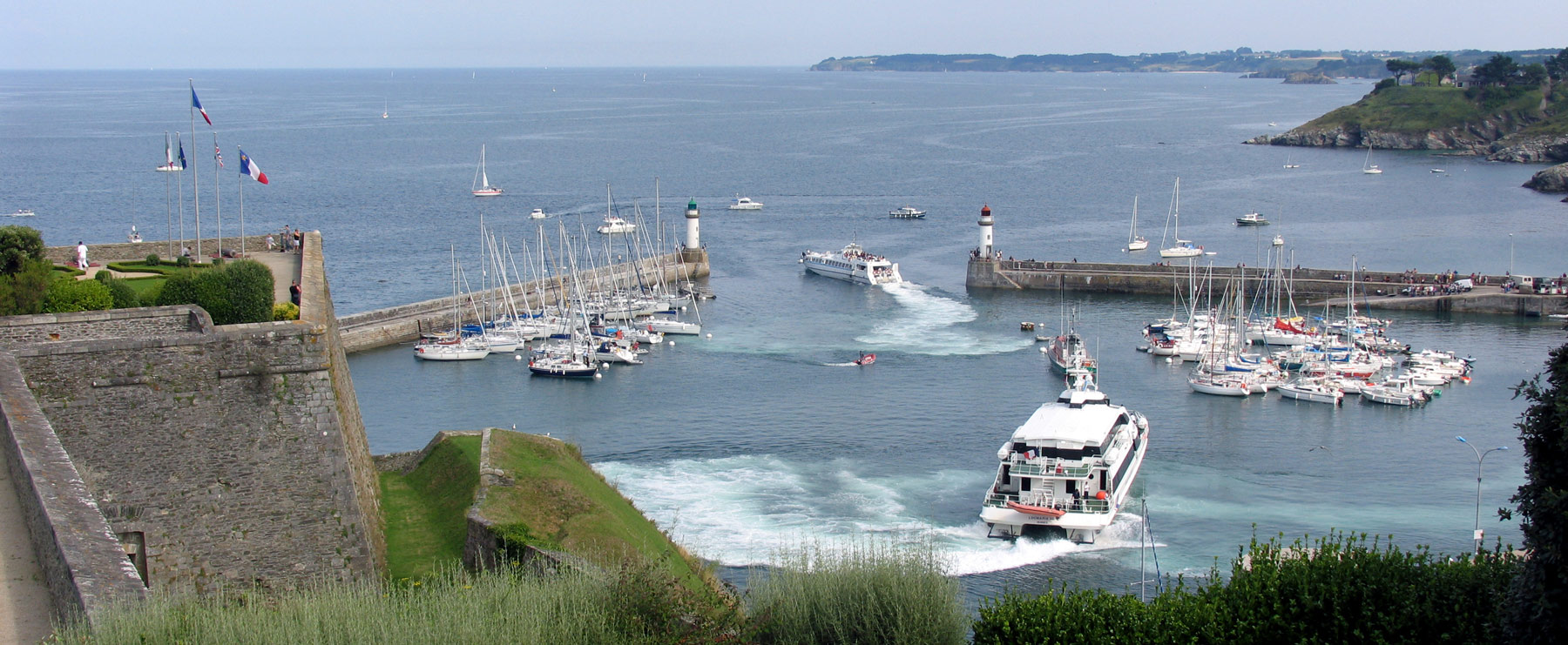 Description : Départ de navettes du port du Palais à Belle Ile Photo prise de la citadelle Vauban Lieu : Pline Belle Ile, Bretagne, France Auteur : Photo personnelle